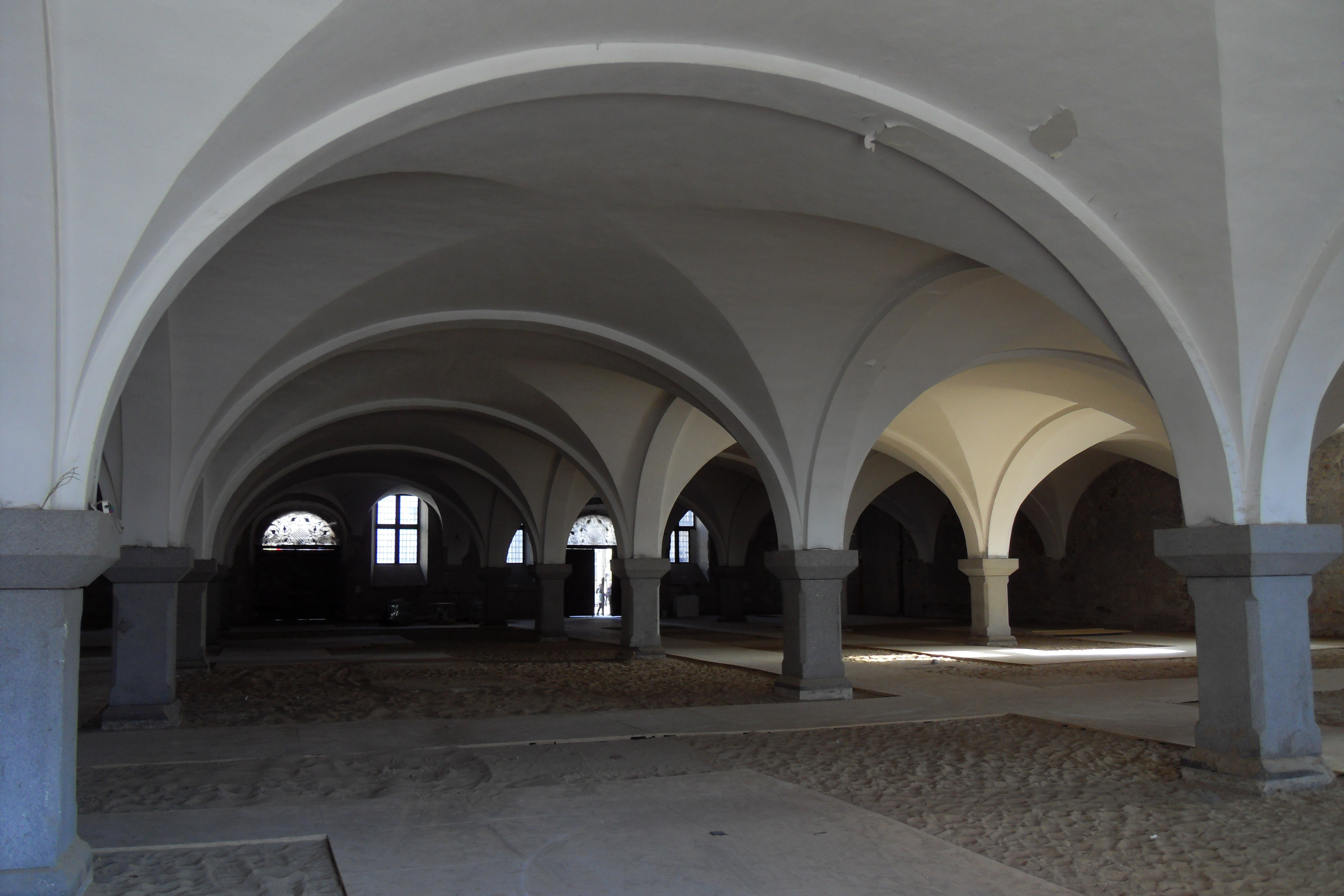 Gdańsk Główne Miasto, Targ Węglowy - Wielka Zbrojownia ze studnią, obecnie ASP, 1602-1605 (parter)